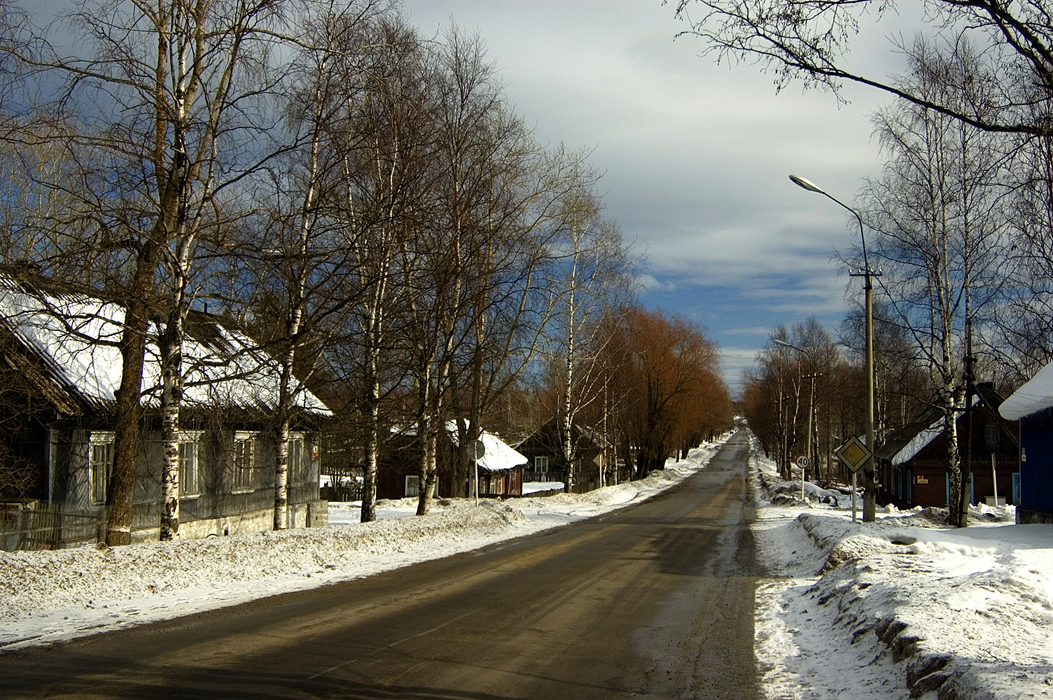 Поселок повенец, деревенская часть поселка